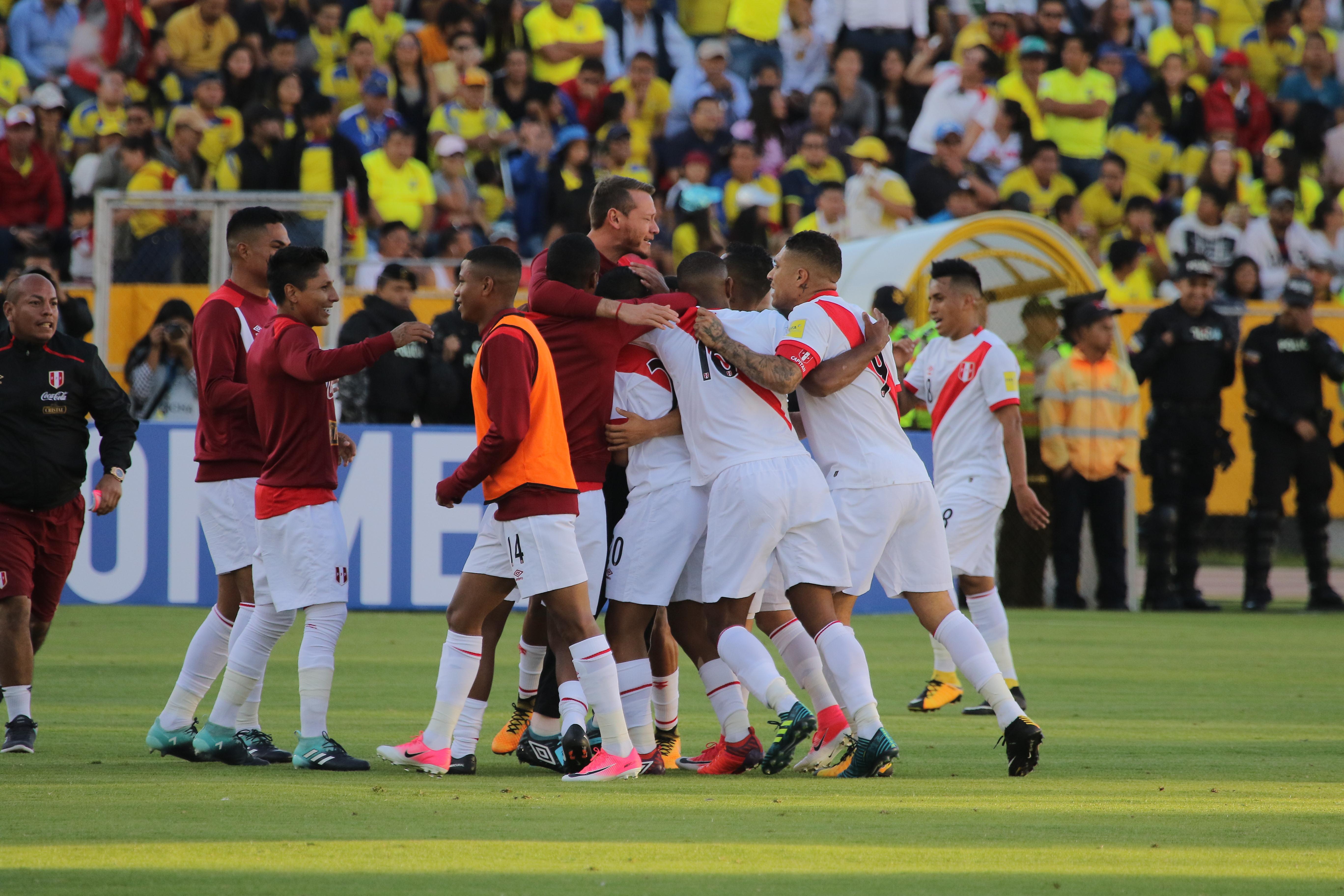 Quito 5 Sep (Andes).- Encuentro por eliminatorias Rusia 2018 entre Ecuador y Perú. Fotografías: Carlos Rodríguez/Andes.